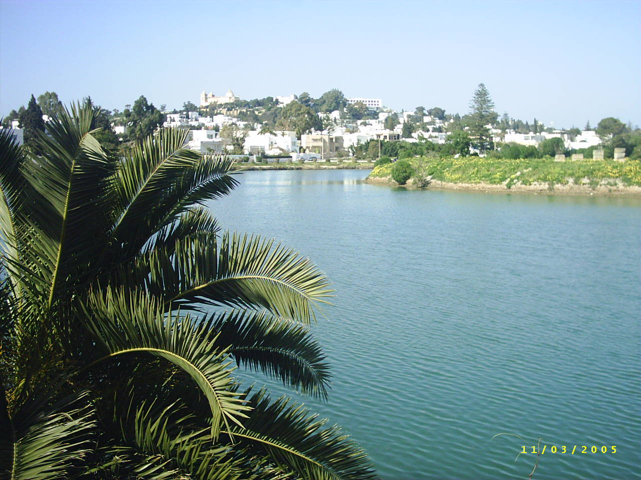 Kartaca Limanı